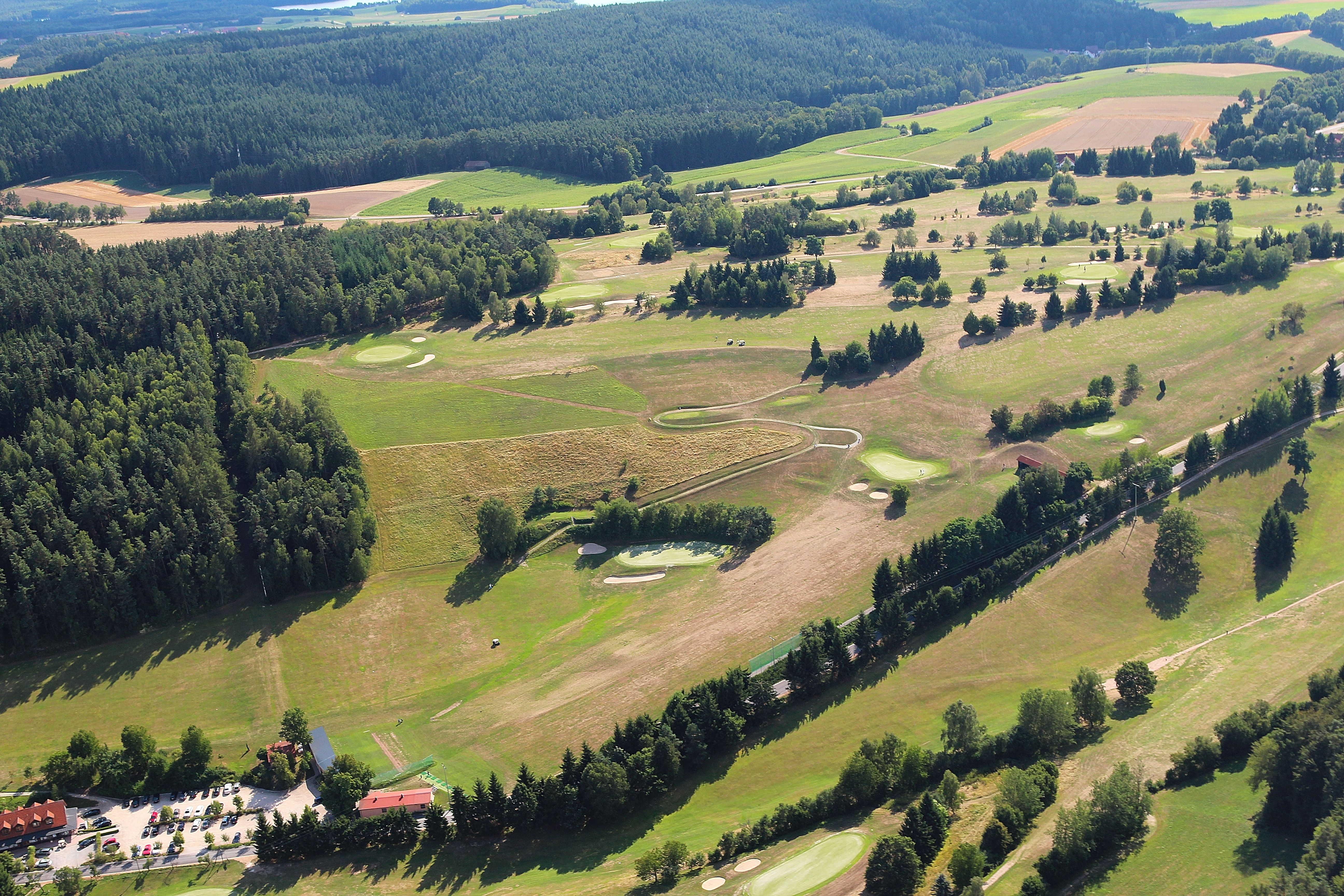 Glfanlage Oedengrub bei Mentah b. Fuhrn, Stadt Neunburg v. Wald, Landkreis Schwandorf, Oberpfalz, Bayern